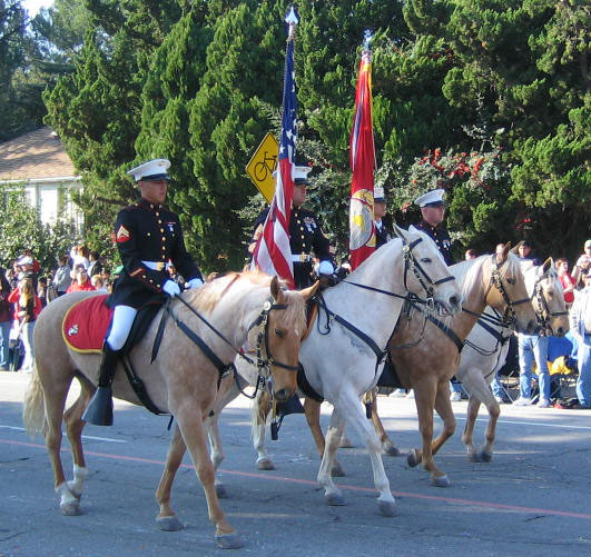 USMC, 2007 Rose Parade